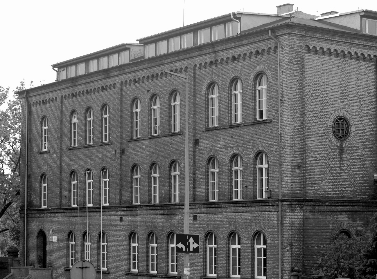 Gimnazjum nr 1 w Stargardzie Szczecińskim, ul. Popiela 2